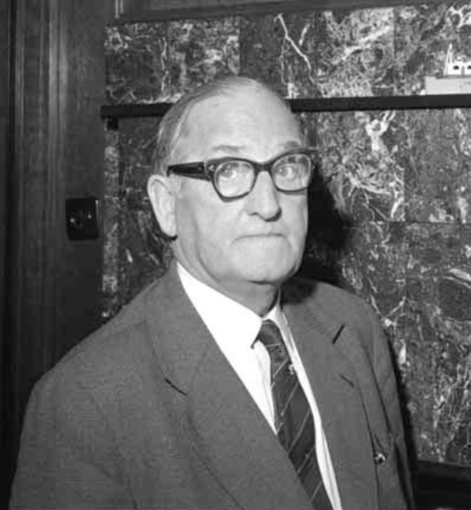 C. Swarttouw, directeur van Cornelis Swarttouw Stuwadoors Maatschappij, bij een modelbouw havenkraan.